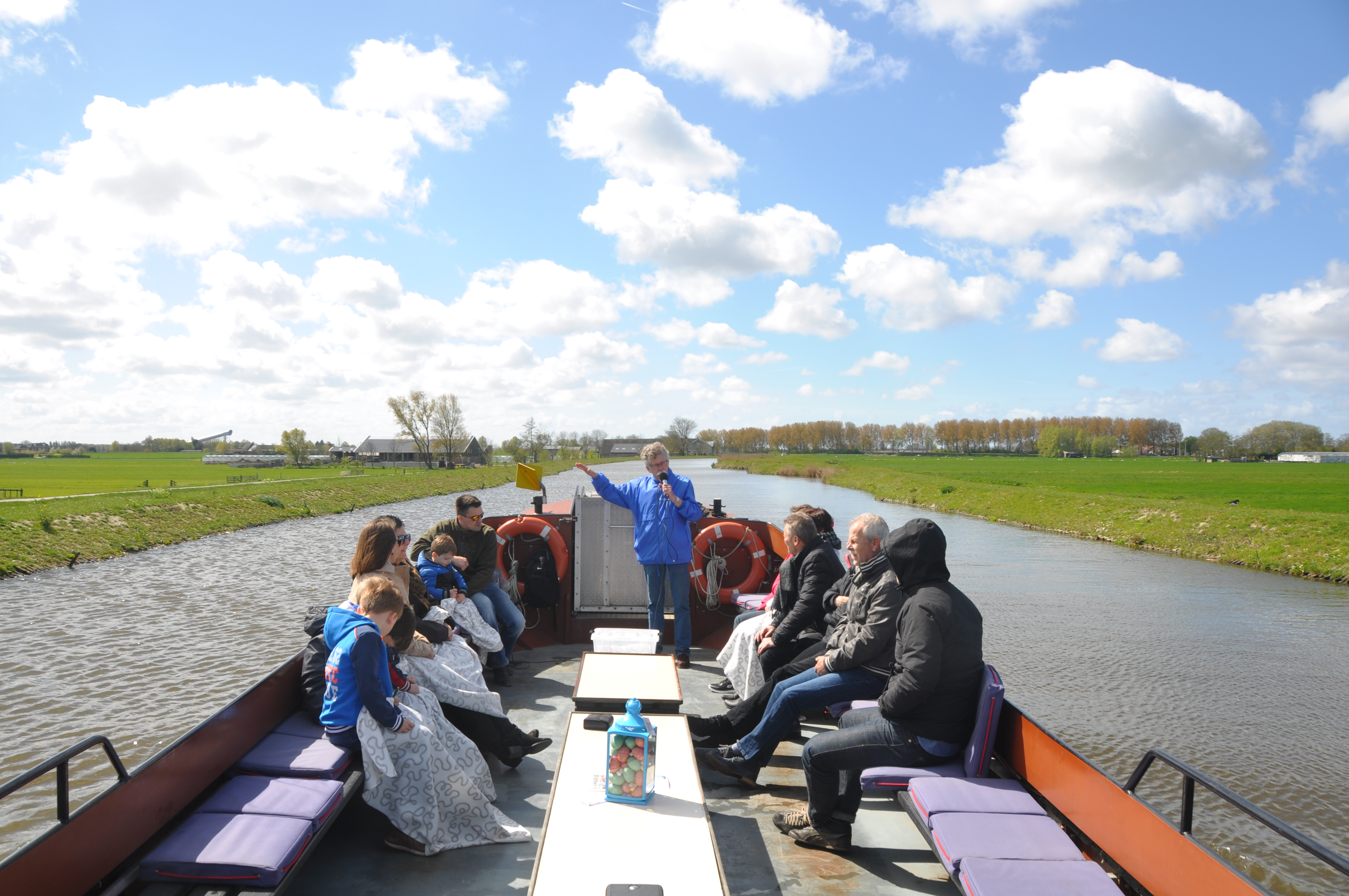 DE MEERVAARDER op de Ommedijkse Watering.